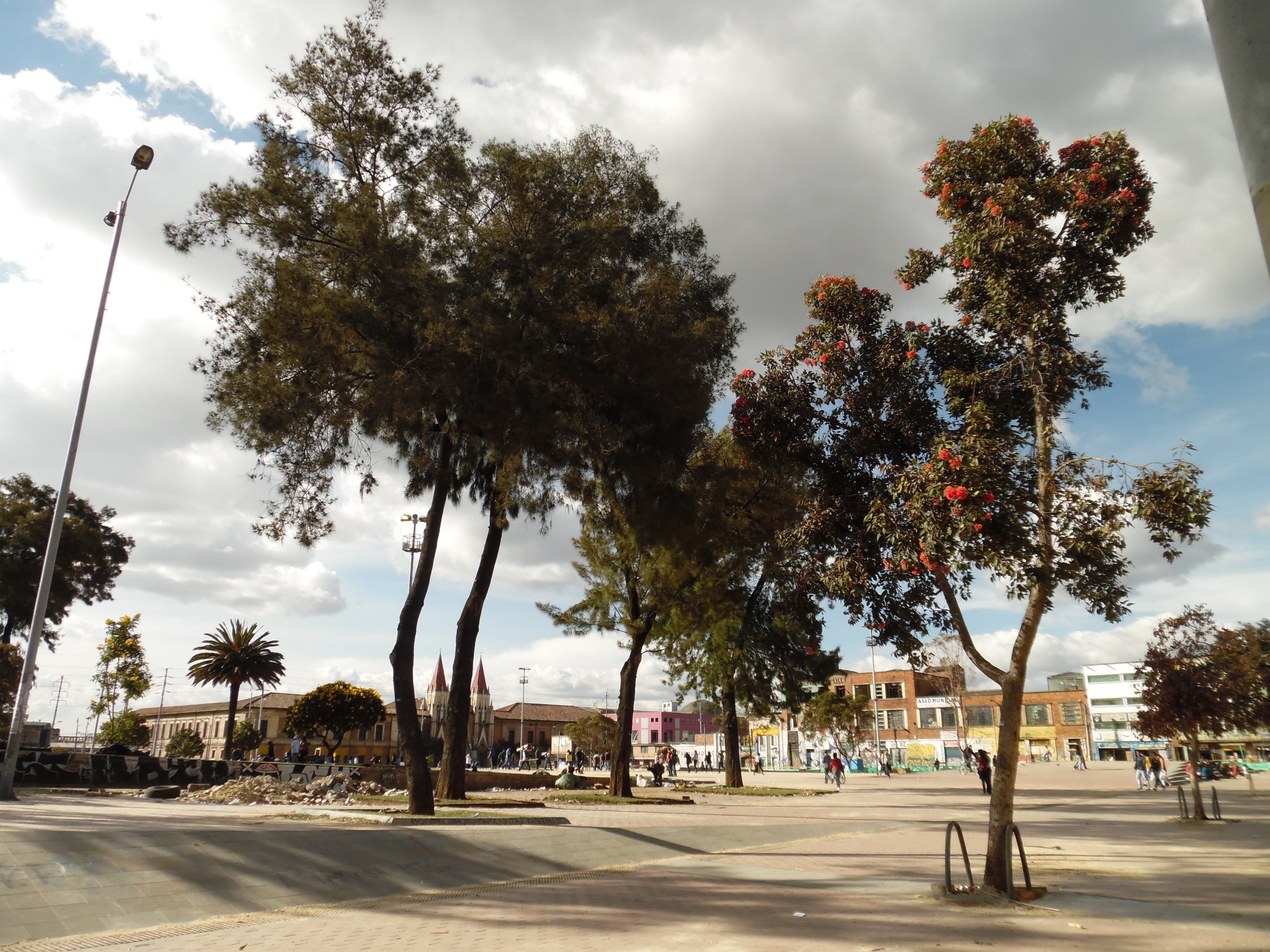 Bogotá